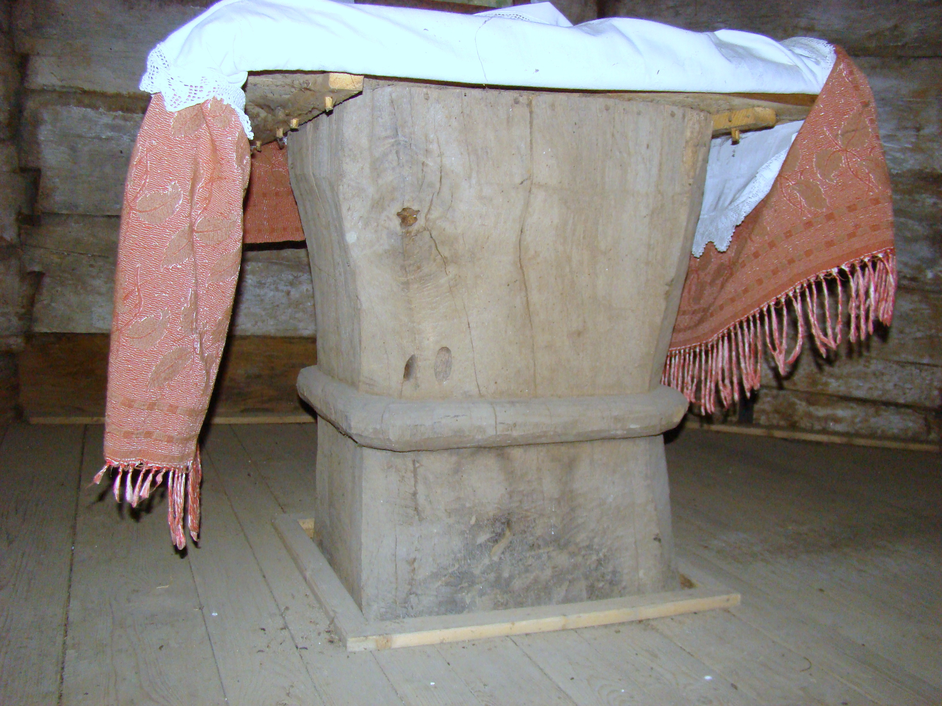 Biserica de lemn „Sfinţii Arhangheli Mihail și Gavriil" din Poarta Sălajului, comuna Românaşi, judeţul Sălaj